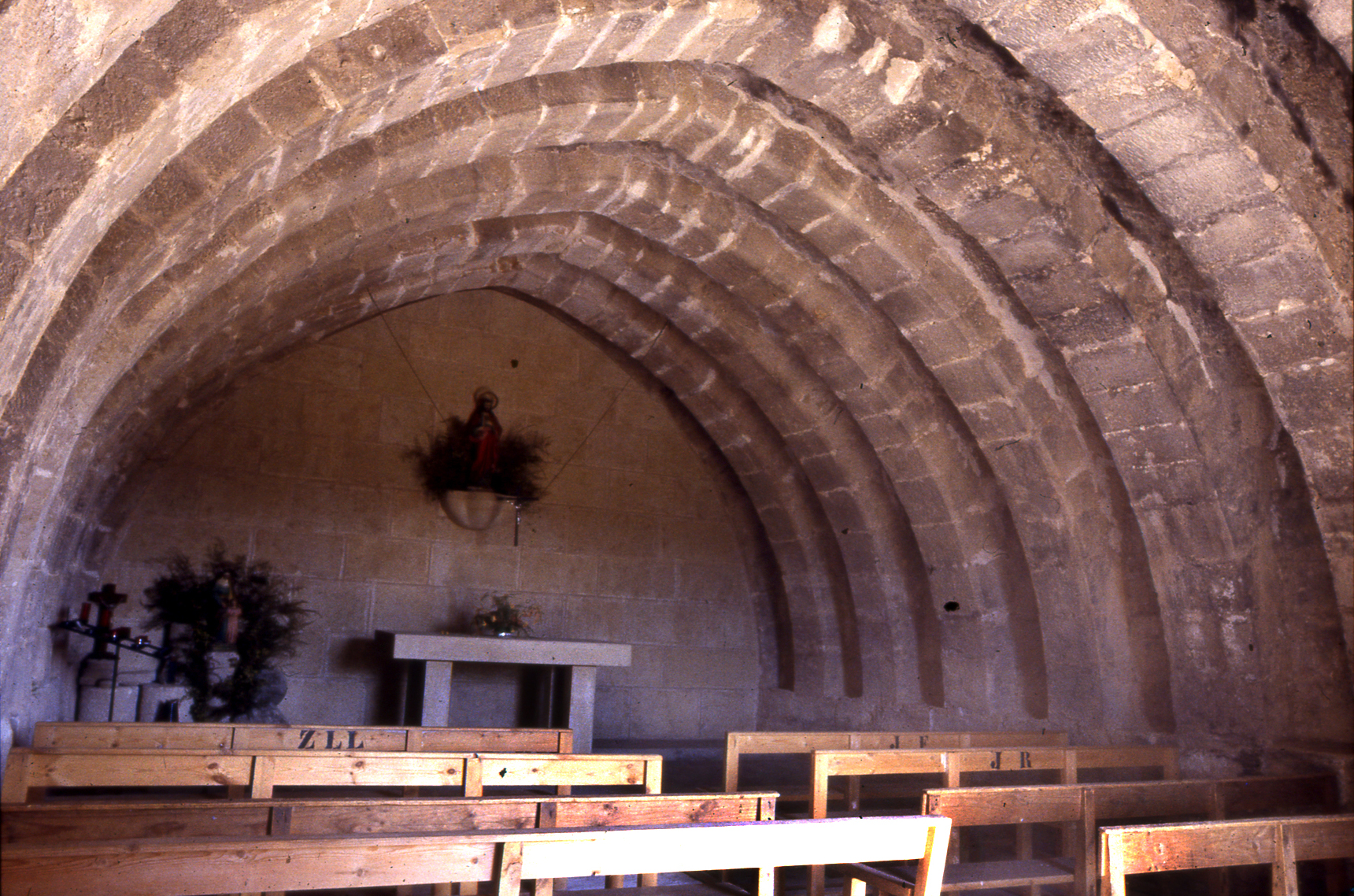 Ermita de Sant Bartomeu de les Camposines (la Fatarella, Terra Alta). Interior del temple.